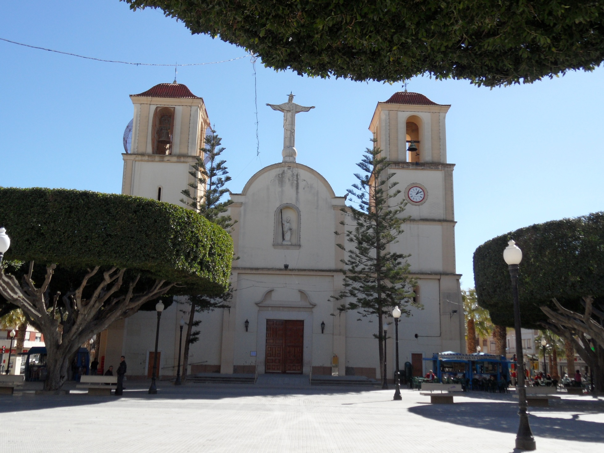 Església de Sant Andreu d'Almoradí (el Baix Segura, País Valencià).